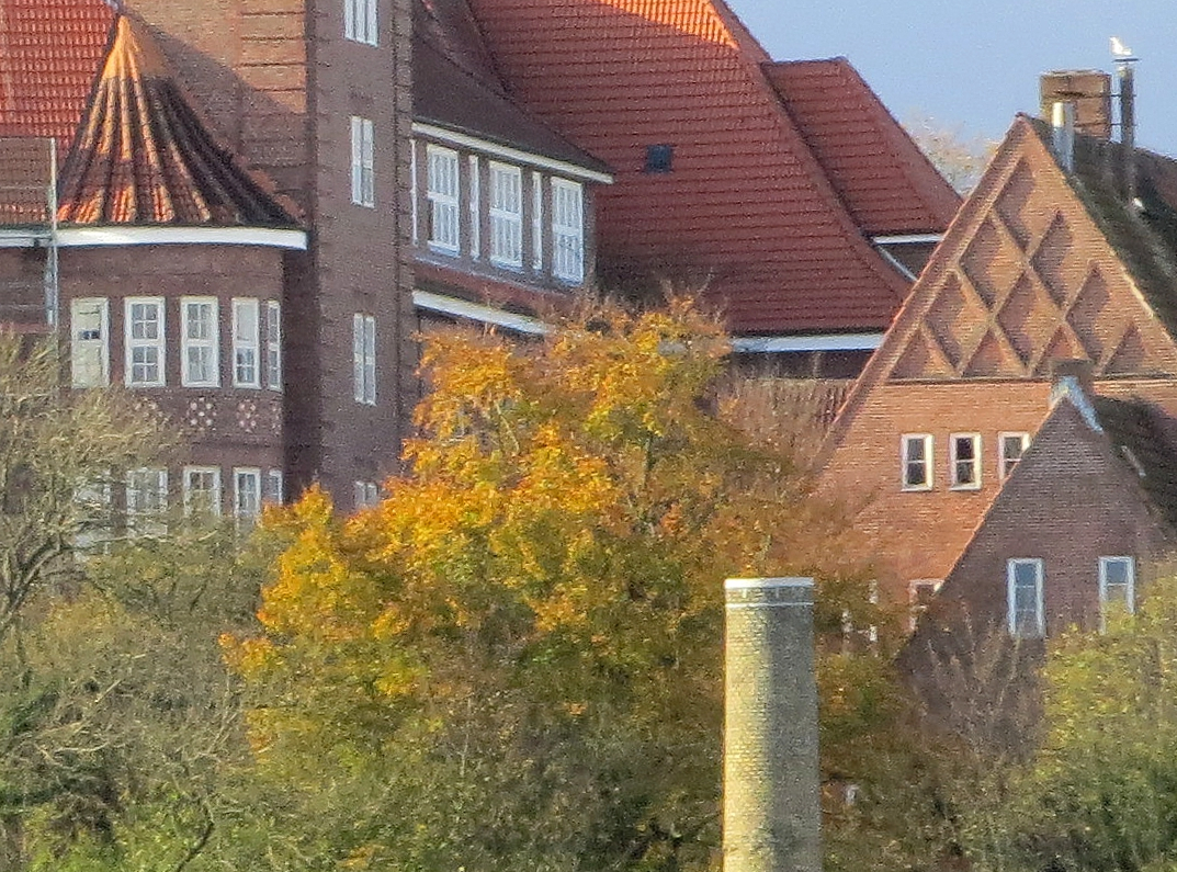 Altes Gymnasium, Flensburg und Landeszentralbankgebäude von der Sankt-Jürgen-Straße, Bild 03